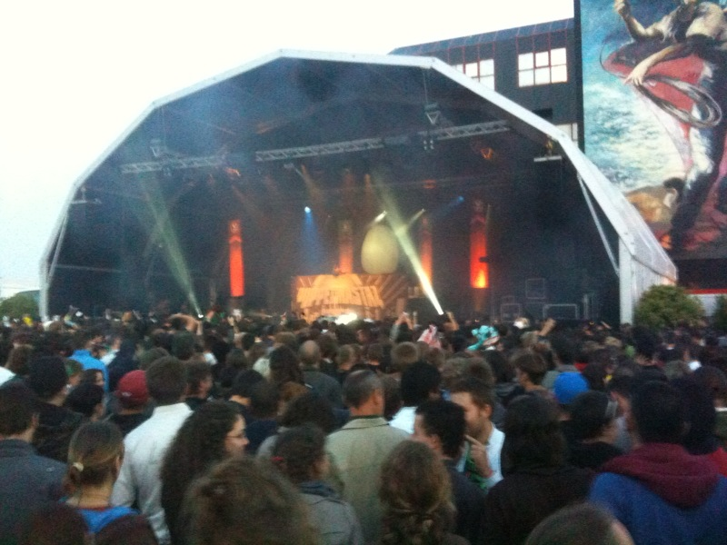 Le groupe Puppetmastaz aux Jeudis du port 2009 dans le cadre du festival Astropolis.